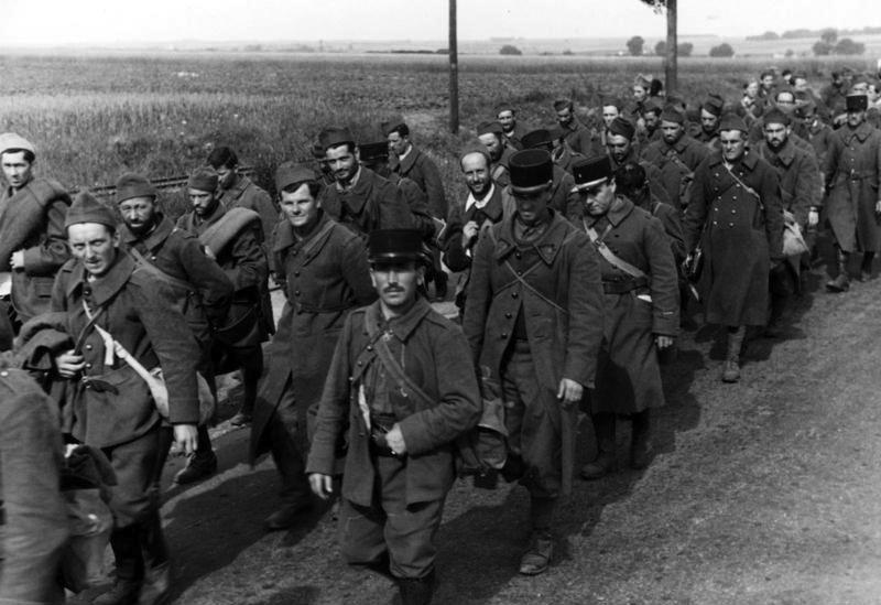 Frz. Kriegsgefangene